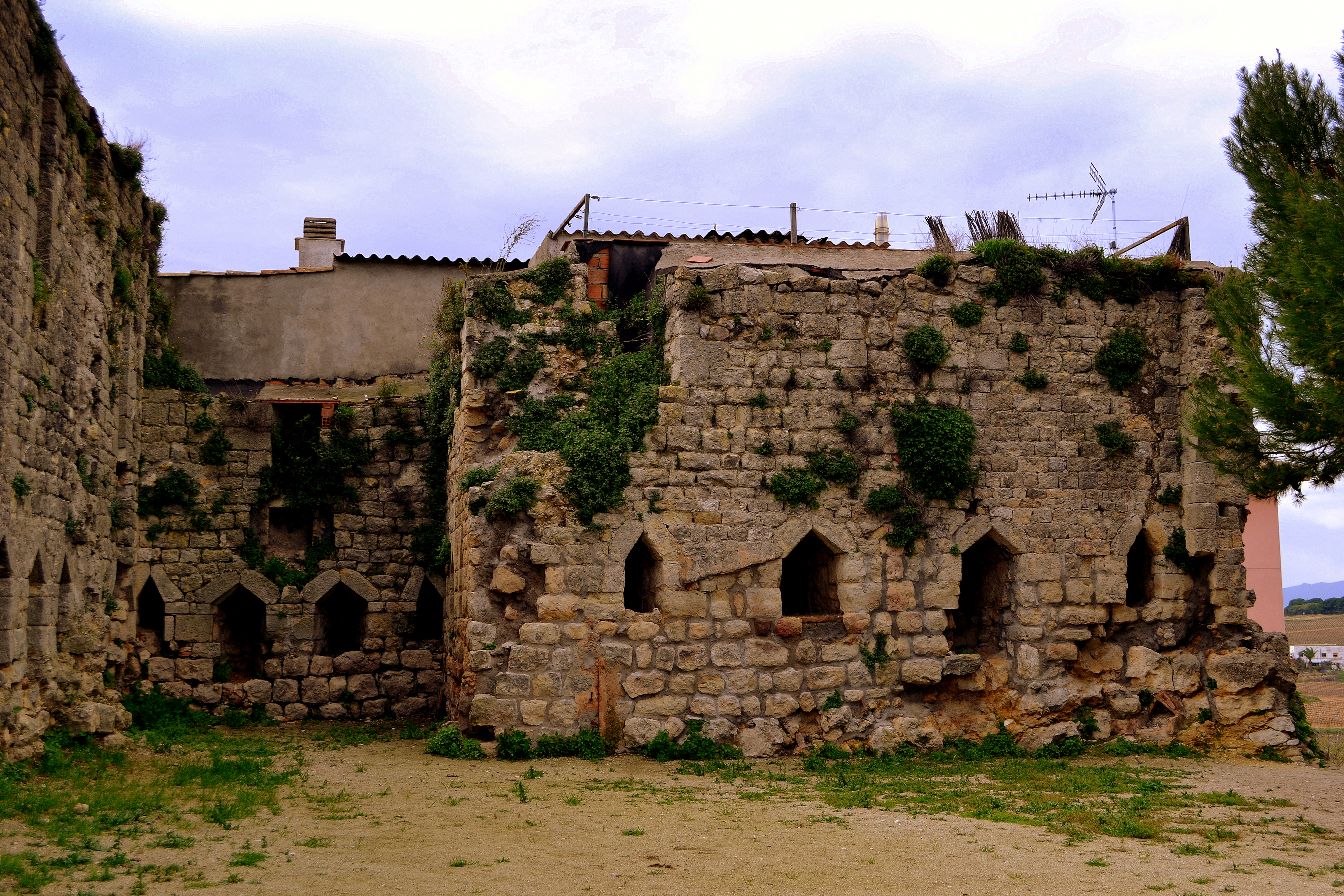 Castell de la Granada